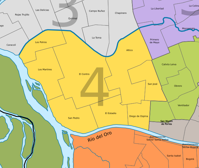 División barrial comuna 4, Neiva, departamento de Huila